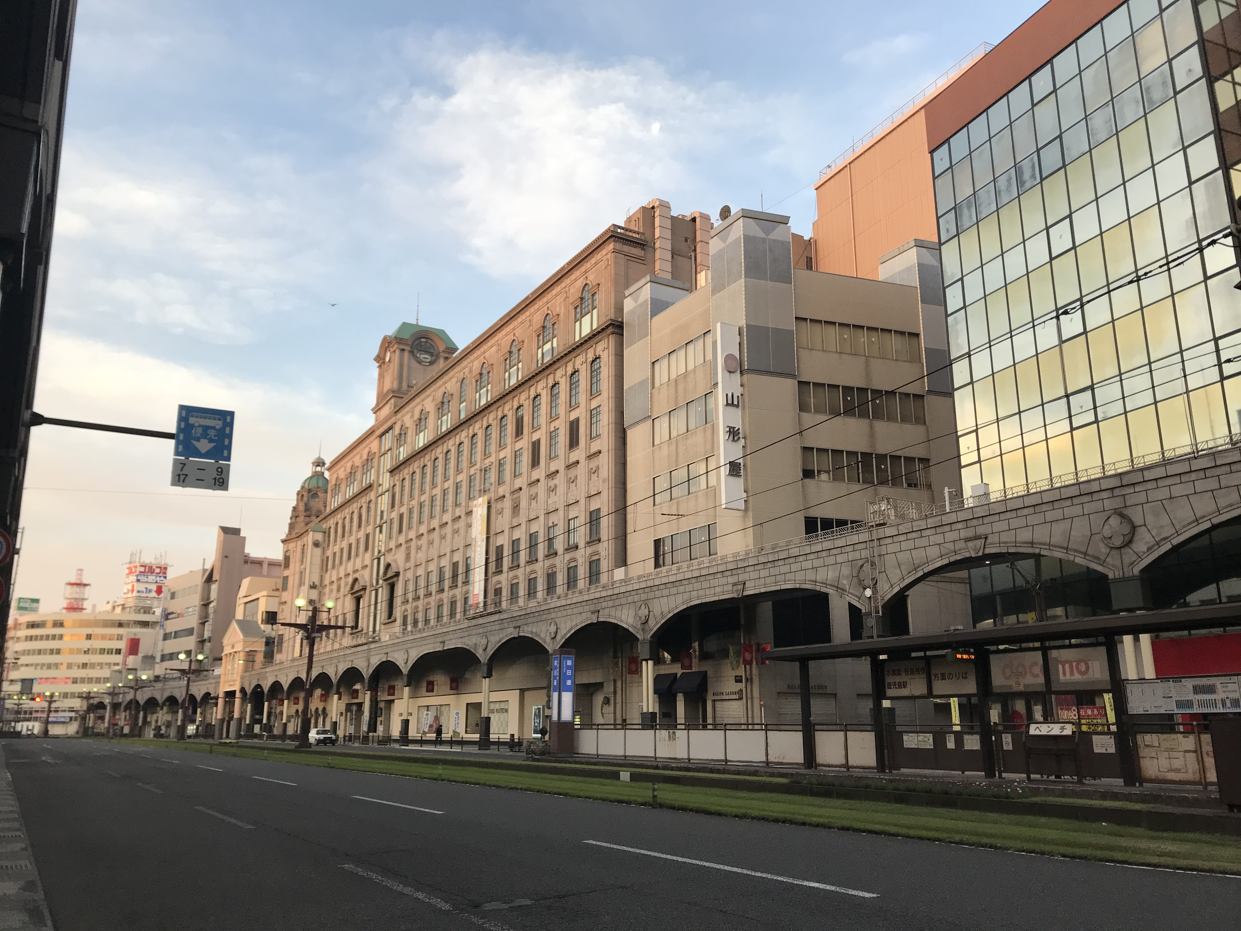 山形屋本店と朝日通電停